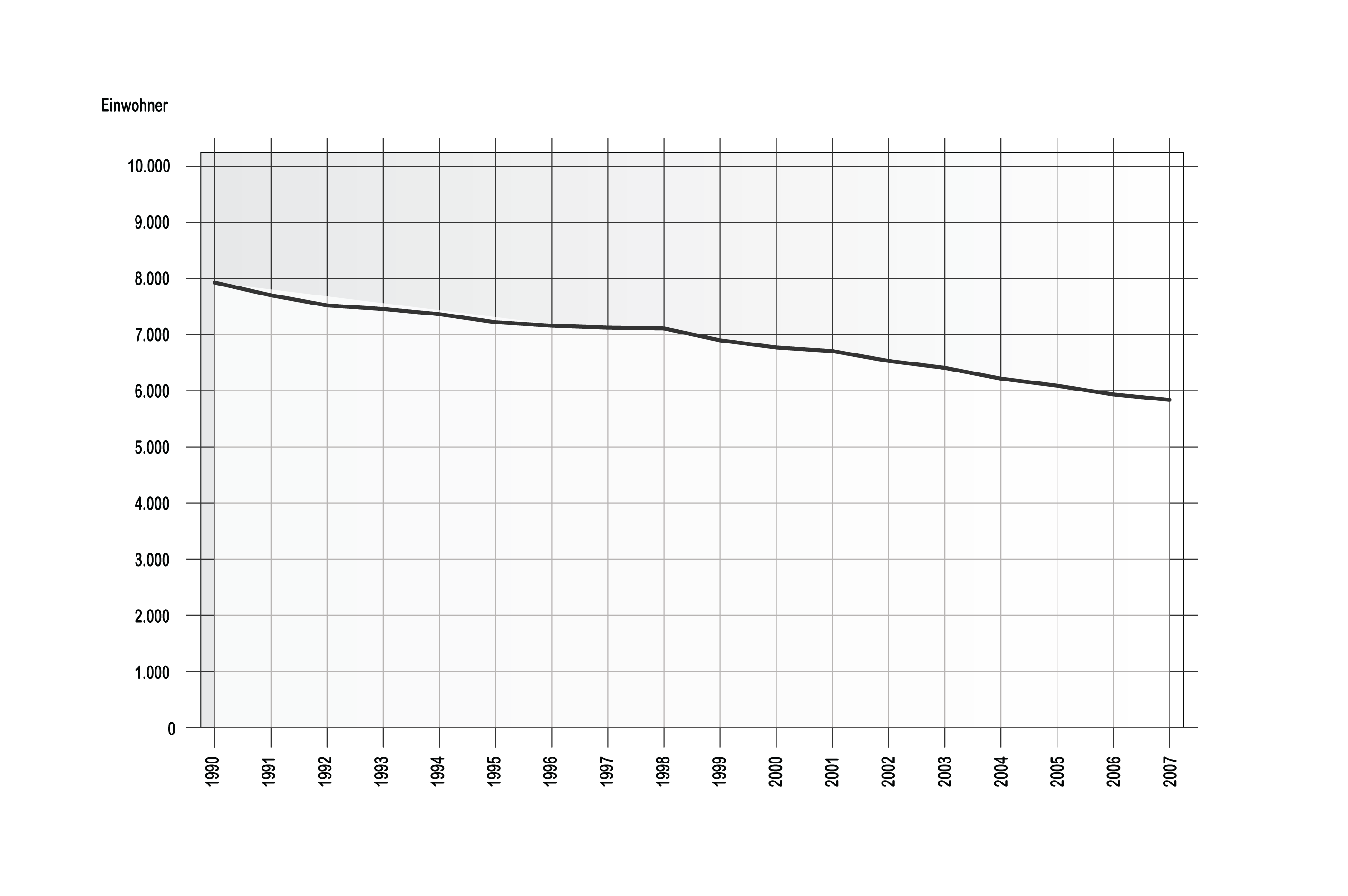 Einwohnerentwicklung Strasburg (Uckermark) 1990 - 2007